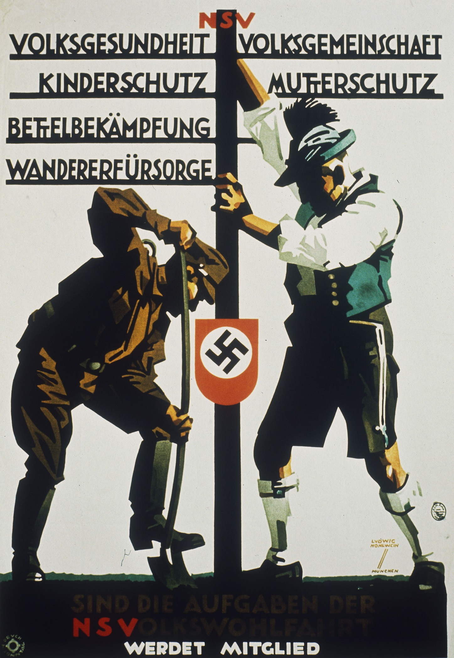 NSDAP Volksgemeinschaft NS VOLKSWOHLFAHRT